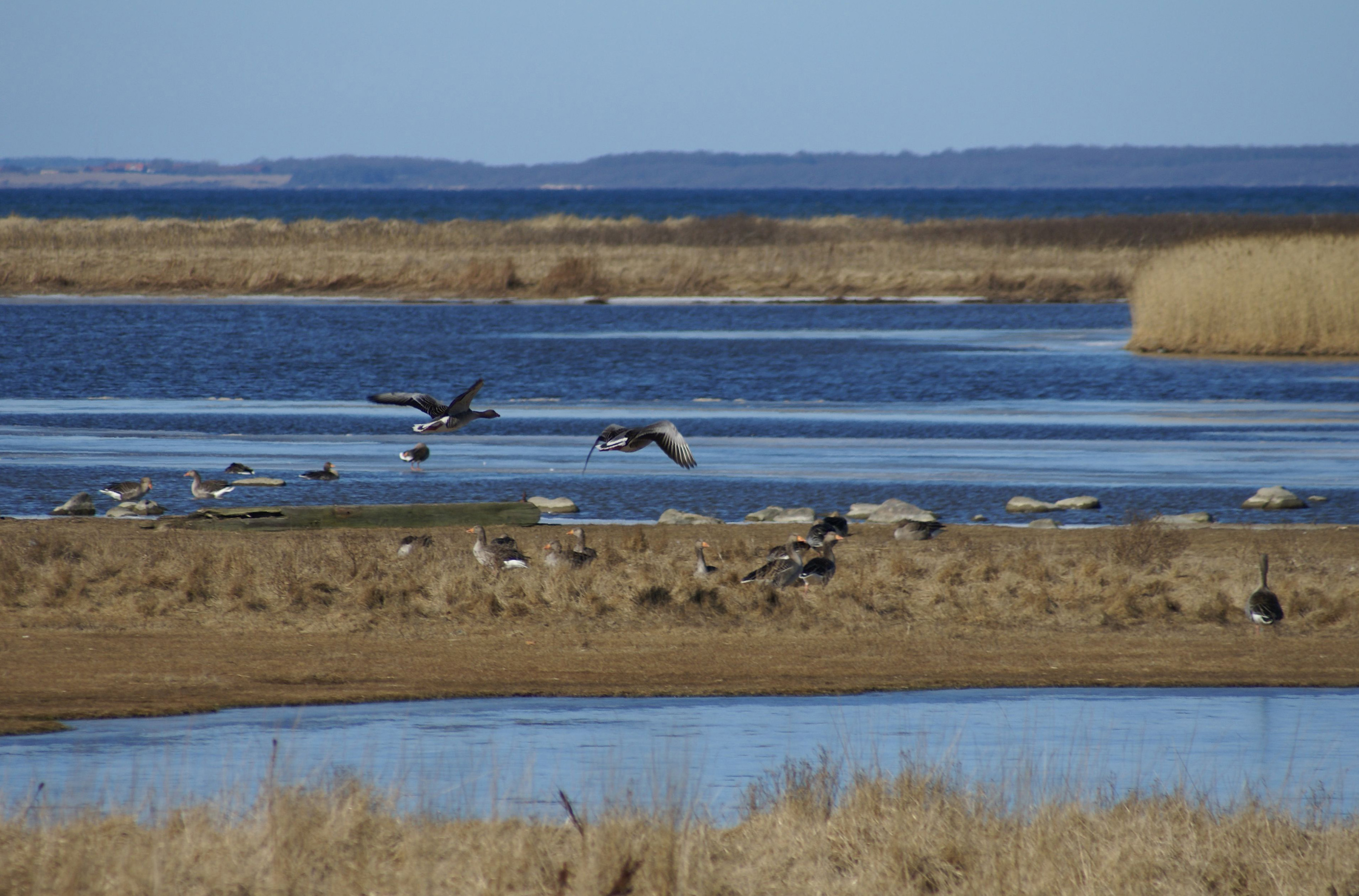 Reersø - ved Flasken - March 2011